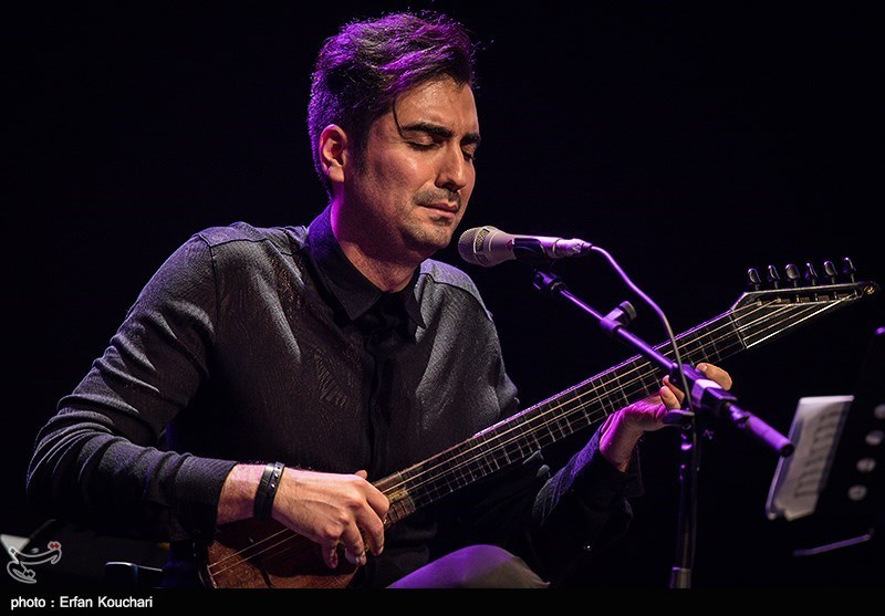 نخستین کنسرت شاهنامه خوانی ایران، پروژه " آواز پارسی" در راستای حفظ و حراست از زبان پارسی، توسط حافظ ناظری و استاد شهرام ناظری سه‌شنبه شب ۱۰ مرداد ماه برگزار شد.